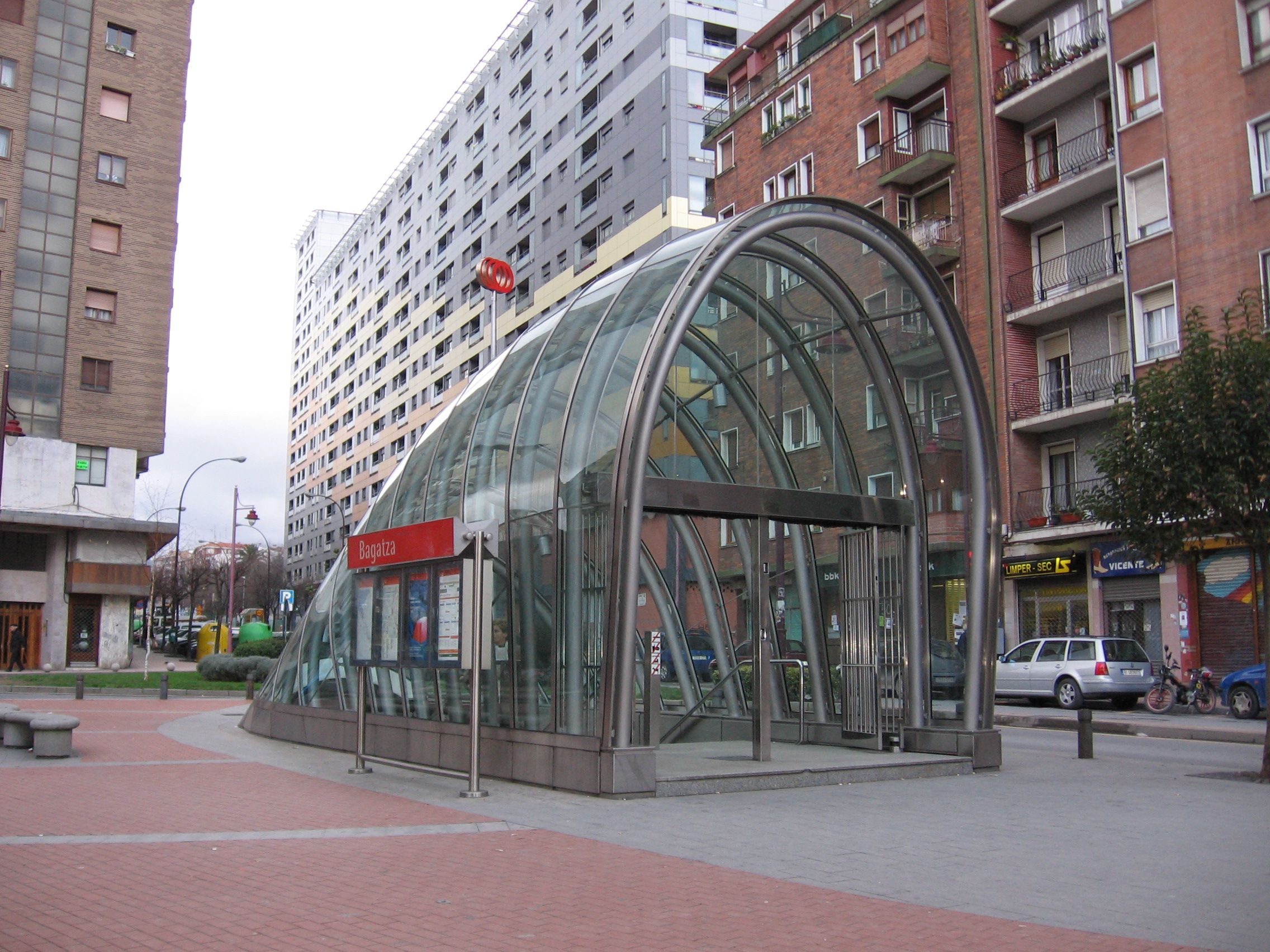 Eingang des Bahnhofs Bagatza der Metro Bilbao, bei Teresa Platz (Barakaldo).